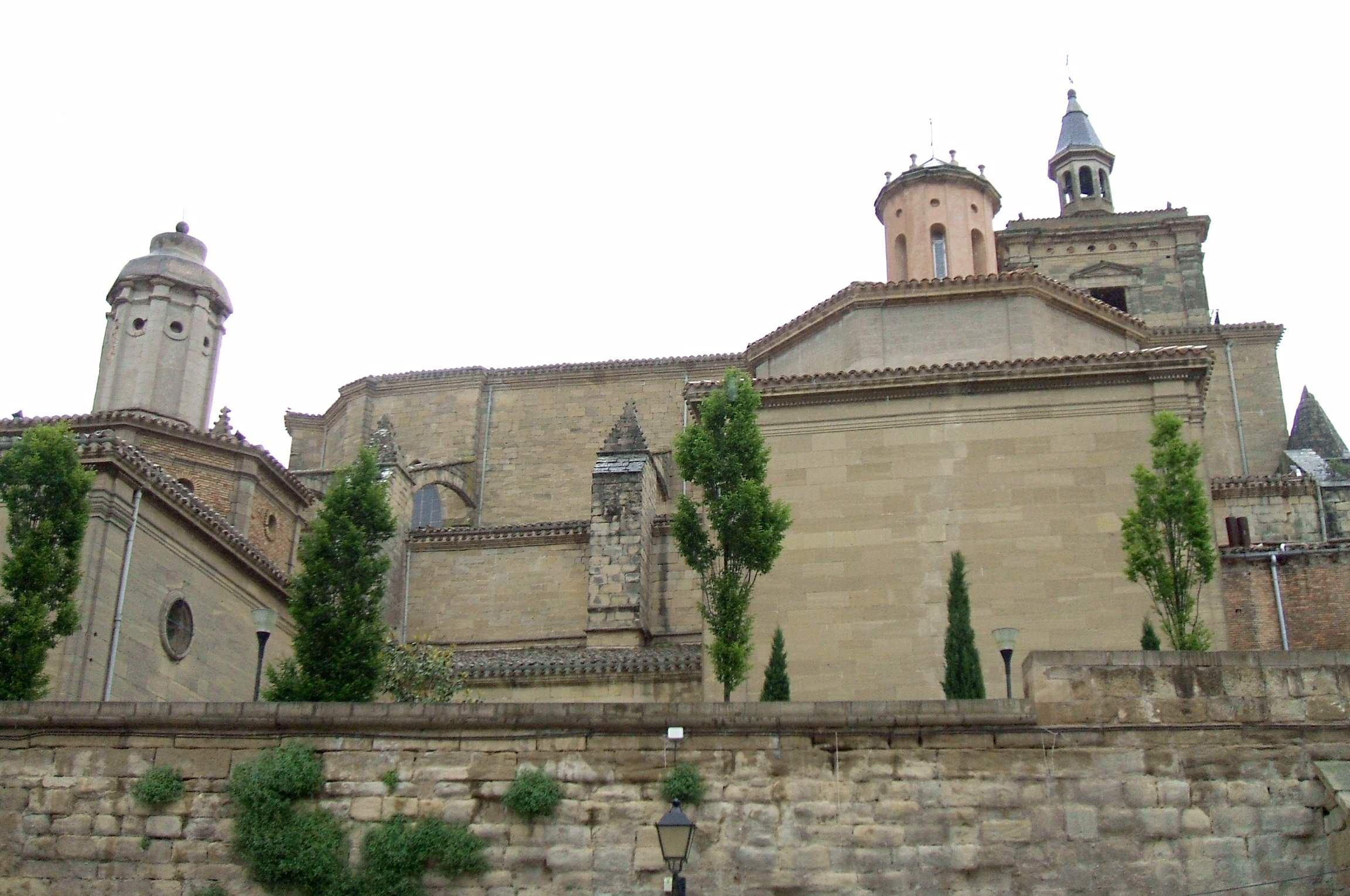 Viana - Iglesia de Santa María